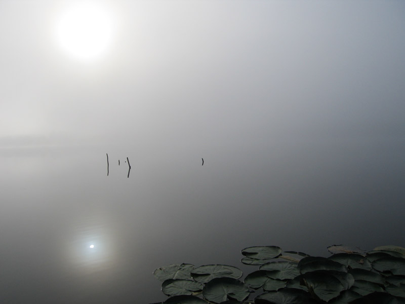 Mist over lake Kaviškis (Lithuania)